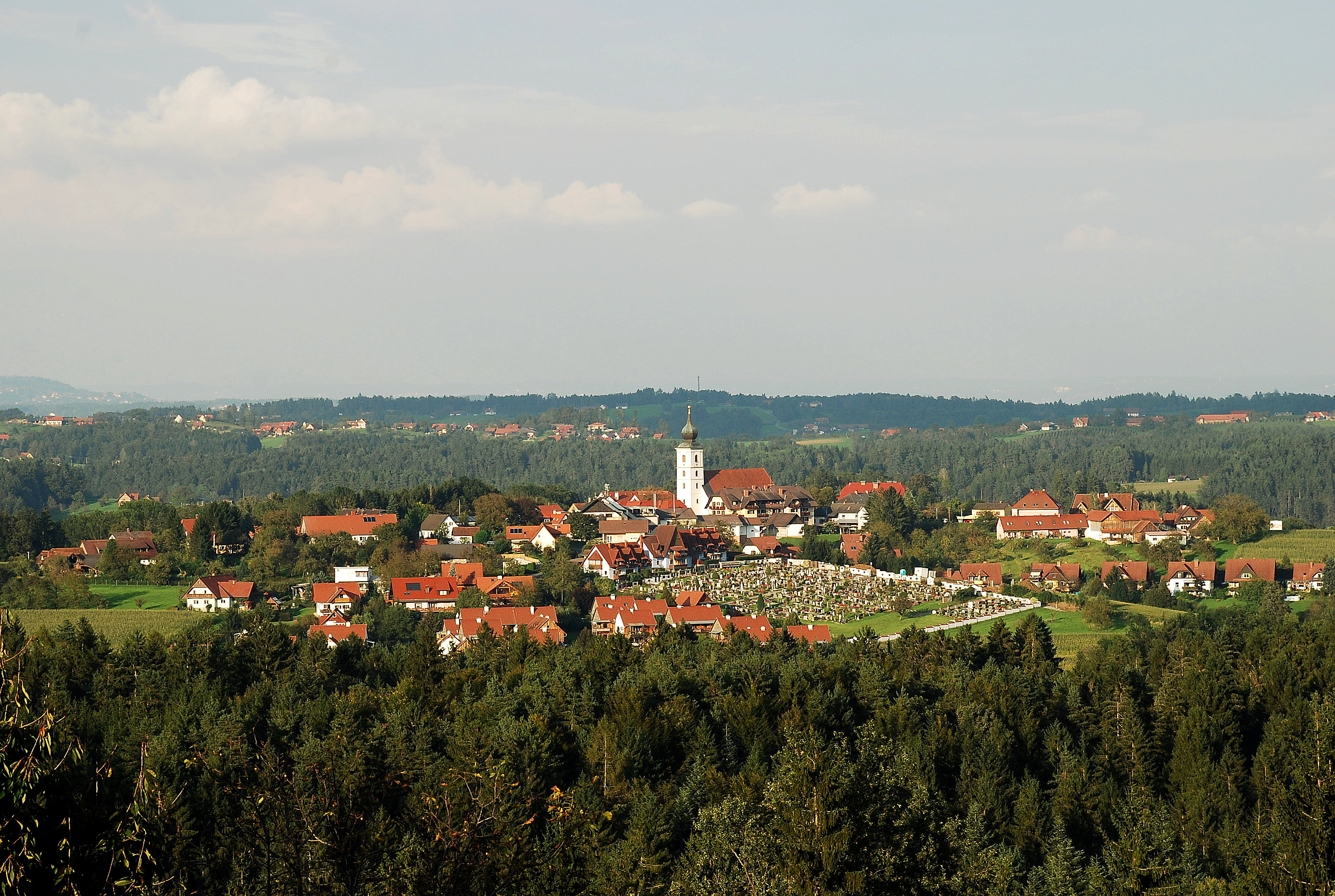 Sankt Stefan ob Stainz von Süden (Hochgrail)